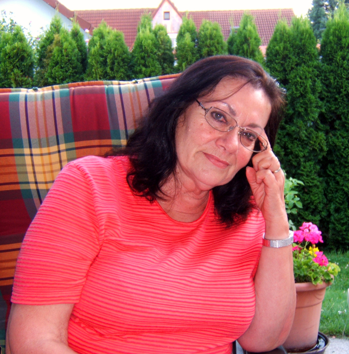 Karla Weigand im Jahre 2007 bei einem Autorentreffen im Haus von Jörg und Karla Weigand.